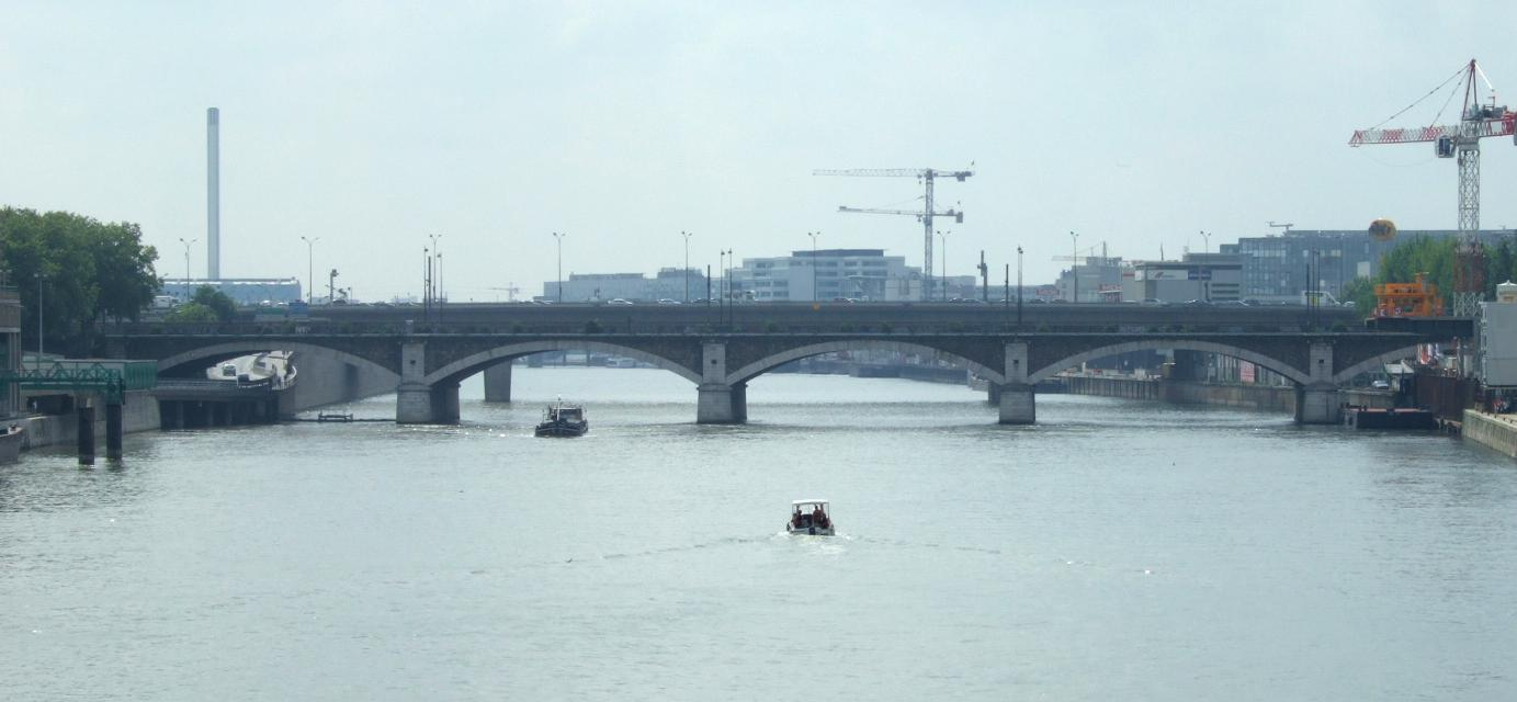 Le pont National, à Paris, vu depuis le pont de Tolbiac, avec au fond le pont amont.